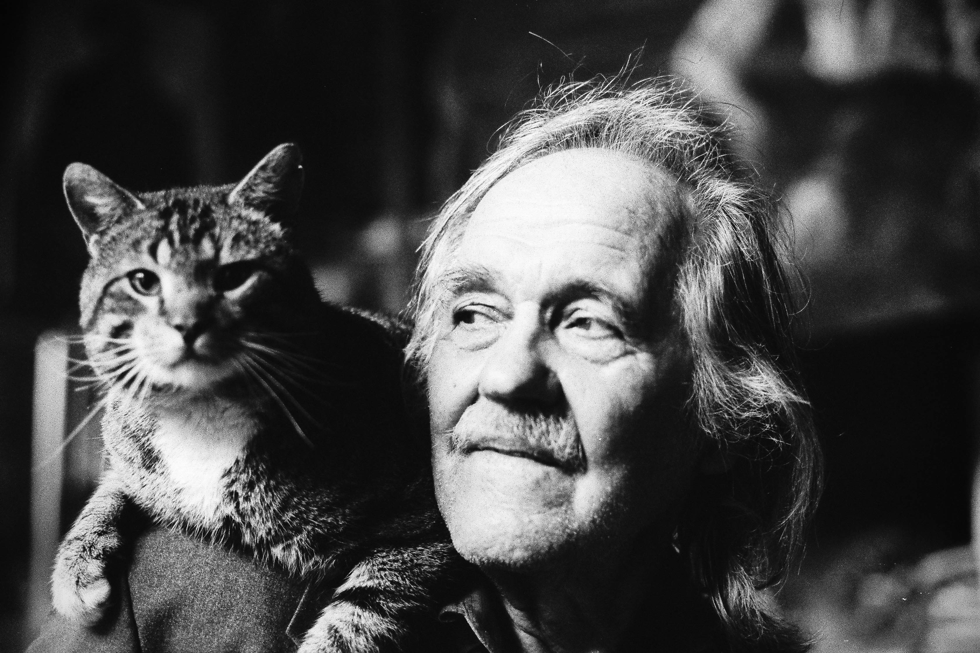 Ignas Stanys ©